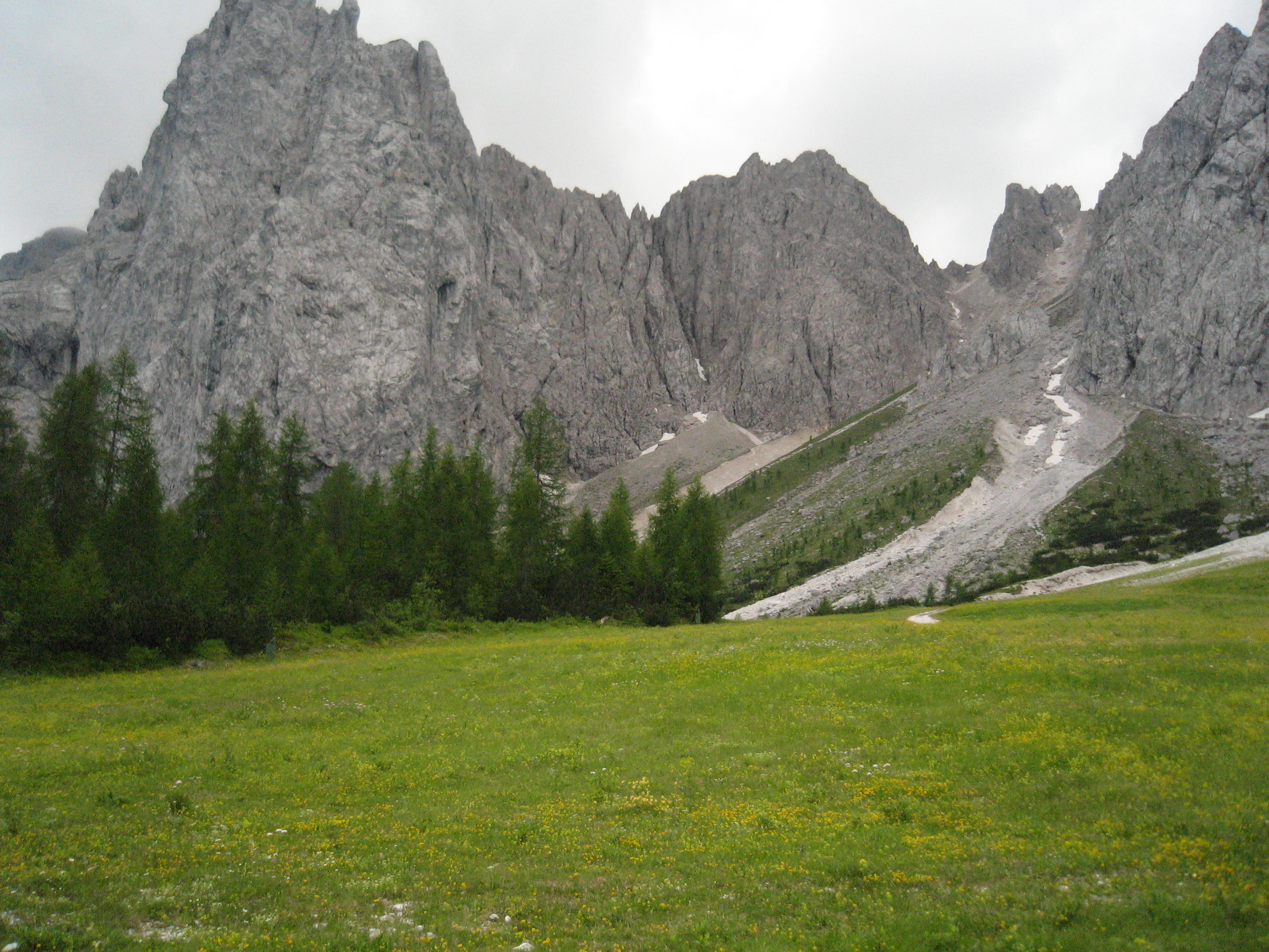 Io, Alpino friulano dichiaro di essere l'autore di questa foto e il detentore del copyright che dono a wikipedia